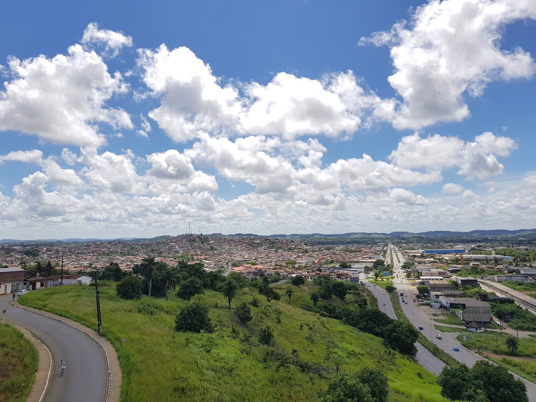 vista área do cabo de santo agostinho direto do teto da universidade